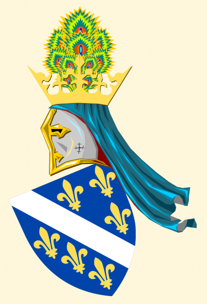 Srpski (latinica): Grb Tvrtka I Kotromanića.